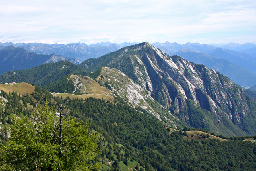 Il Pizzo Ruscada visto dall'anticima del Monte Ziccher, in Val Vigezzo.